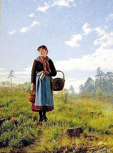 Blueberry Pickerlabel QS:Len,"Blueberry Picker" label QS:Lde,"Heidelbeerpflückerin"